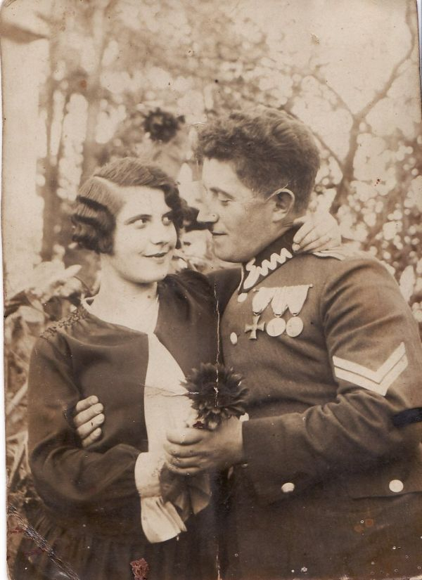 Władysław Mrozowski - st. sierżant WP